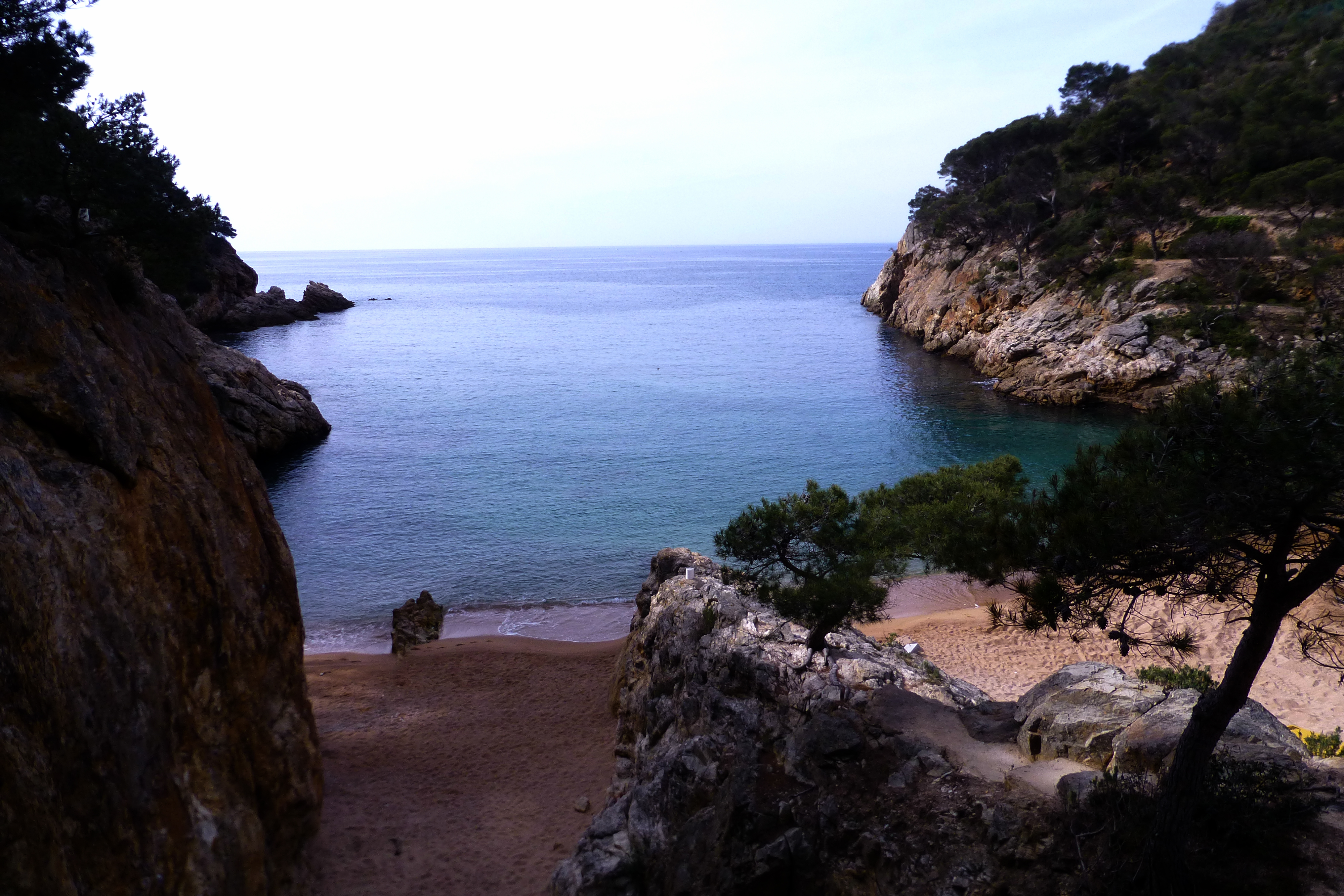 Massís de les Cadiretes This is a a photo of a natural area in Catalonia, Spain, with id: ES510128